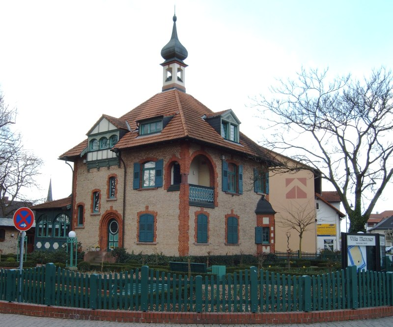 Villa Meixner in Brühl